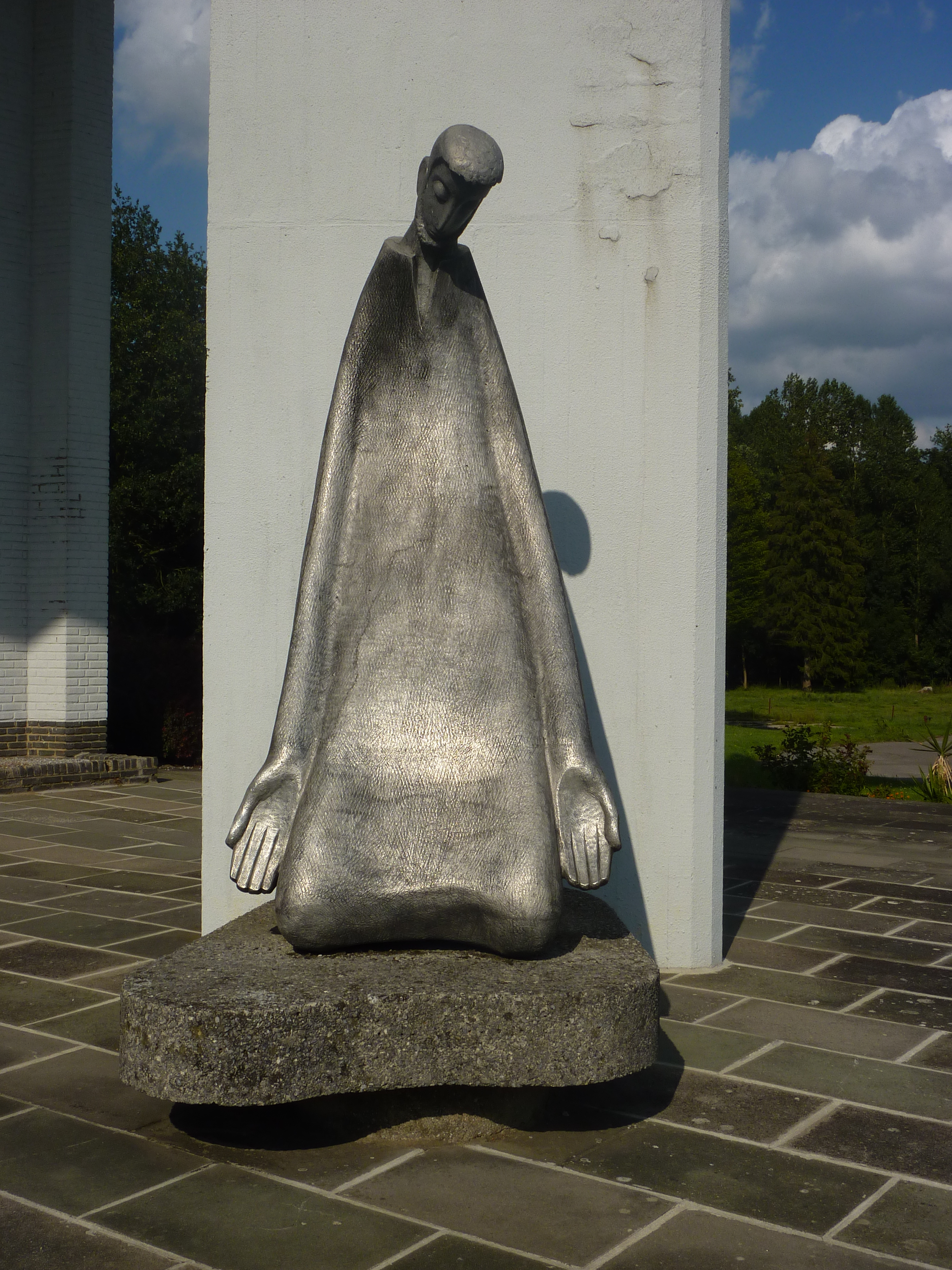 Chapelle-Mémorial Kongolo de Gentinnes, Belgique.